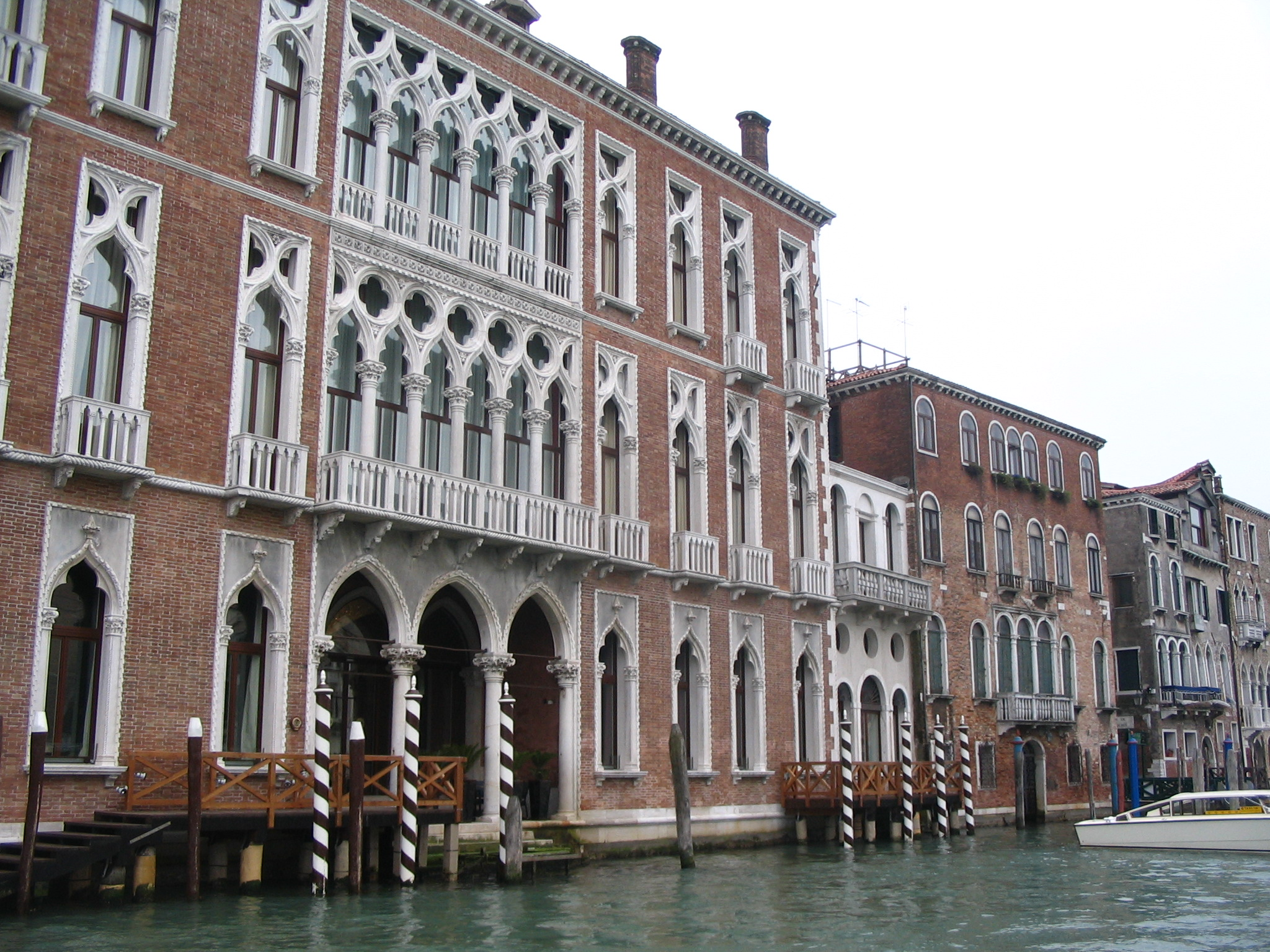 Ca' Genovese - Grand canal - Venise -Italie